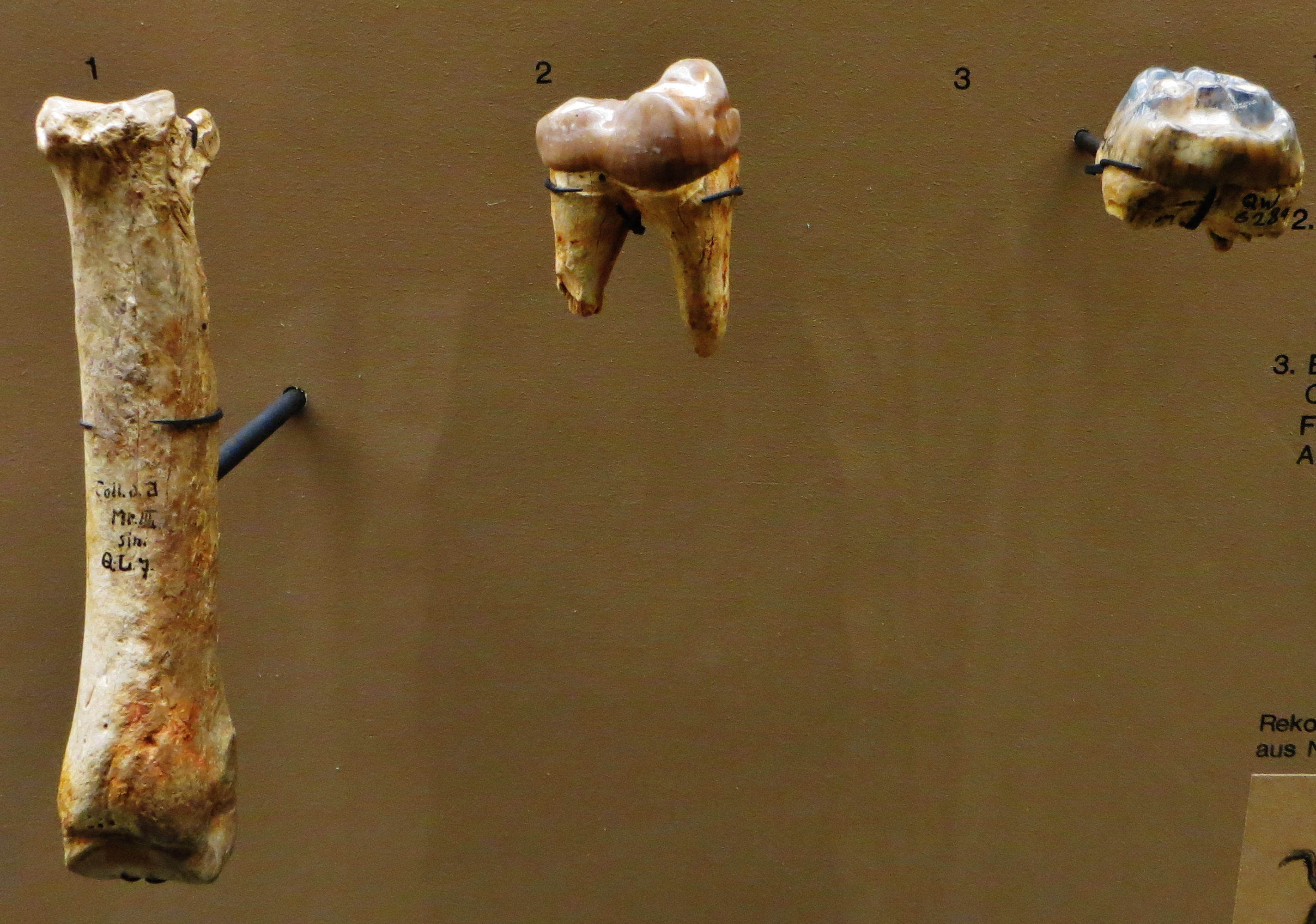 Fossil of Entelodon - Took the picture at Natural History Museum, Basel